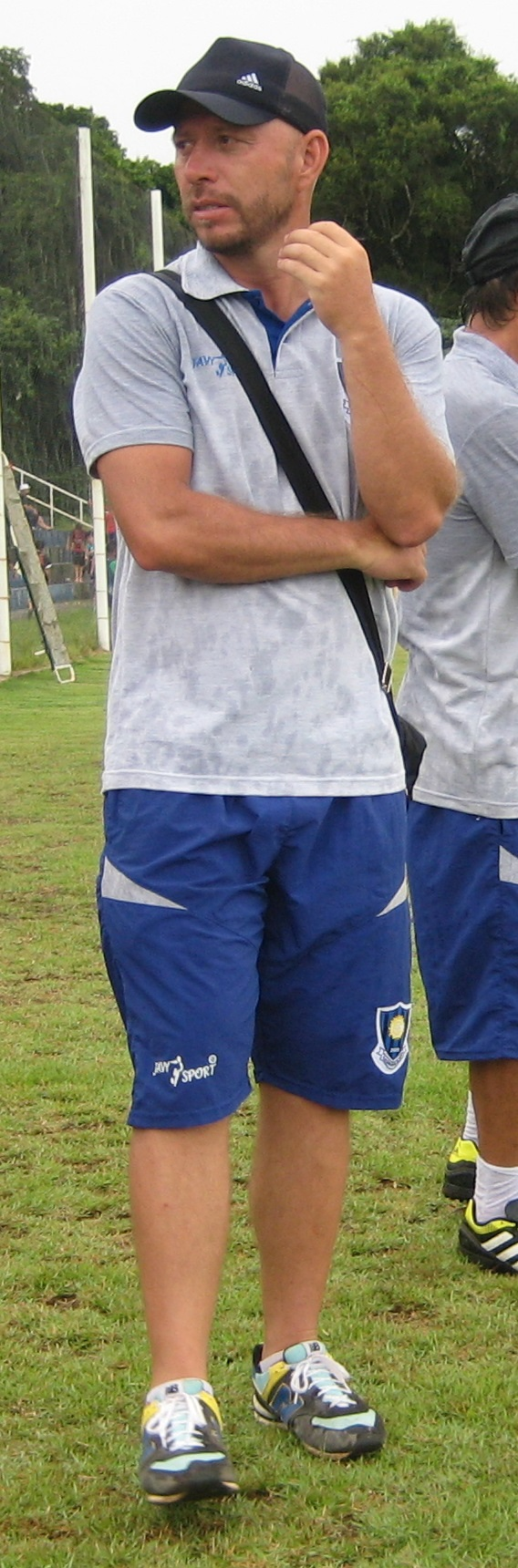 DT del Club Deportivo Sol del Este